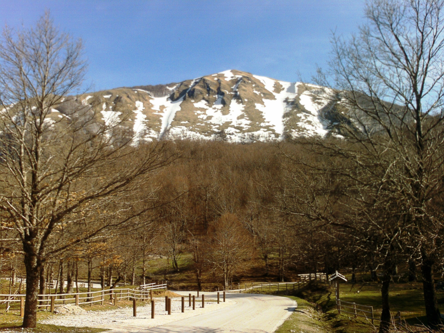 Contrafforte nord del Monte Volturino (1.836 m) - Monti della Maddalena (Potenza).